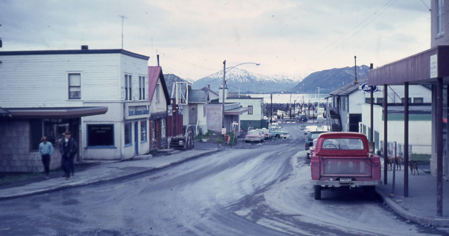 Street in 1965, Kodiak, Alaska